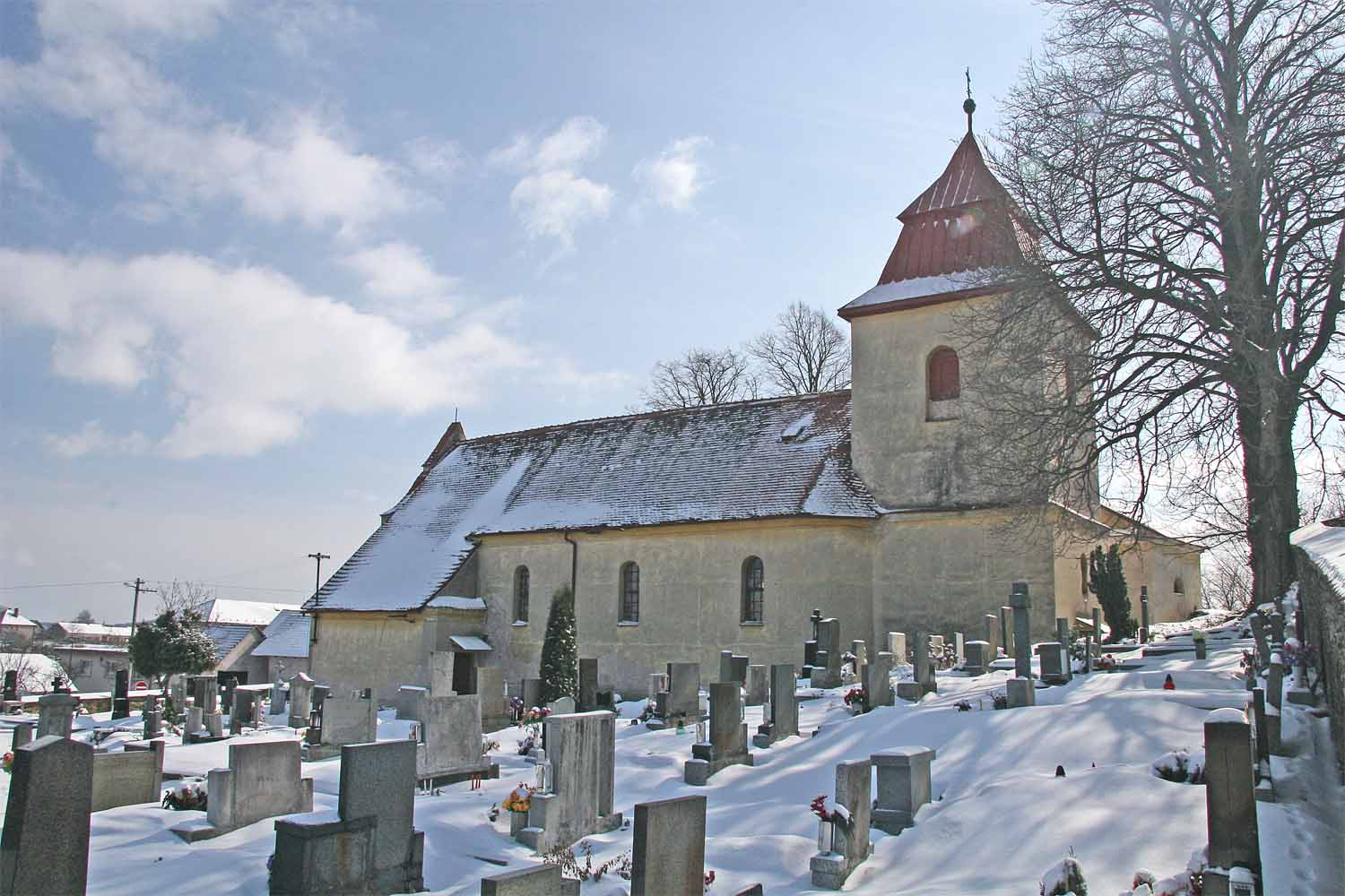 Raně gotický kostel Sv. Martina z poloviny 13. století v Turkovicích, okres Pardubice